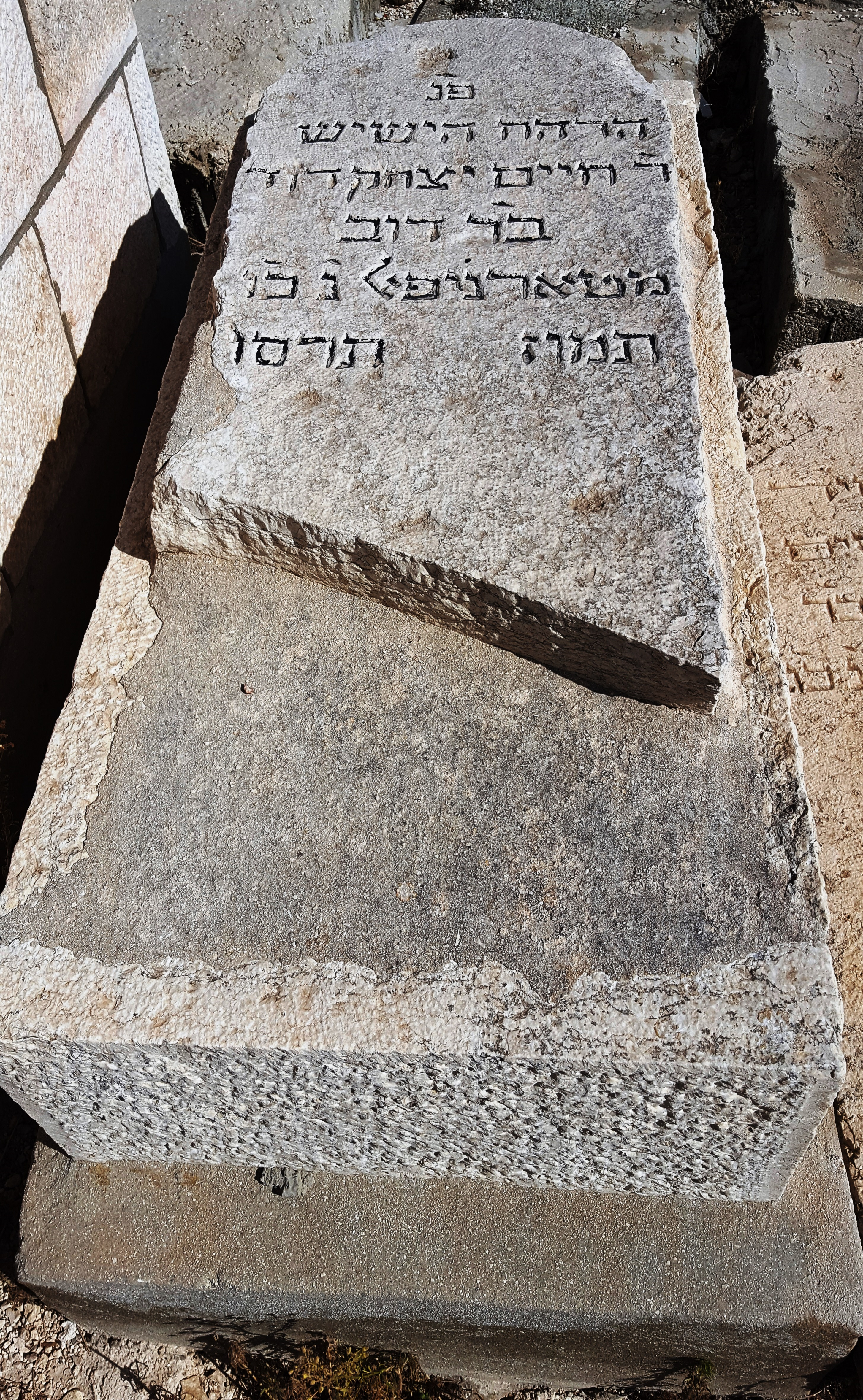 מצבת קברו של רבי חיים יצחק דוד ווייץ בהר הזיתים